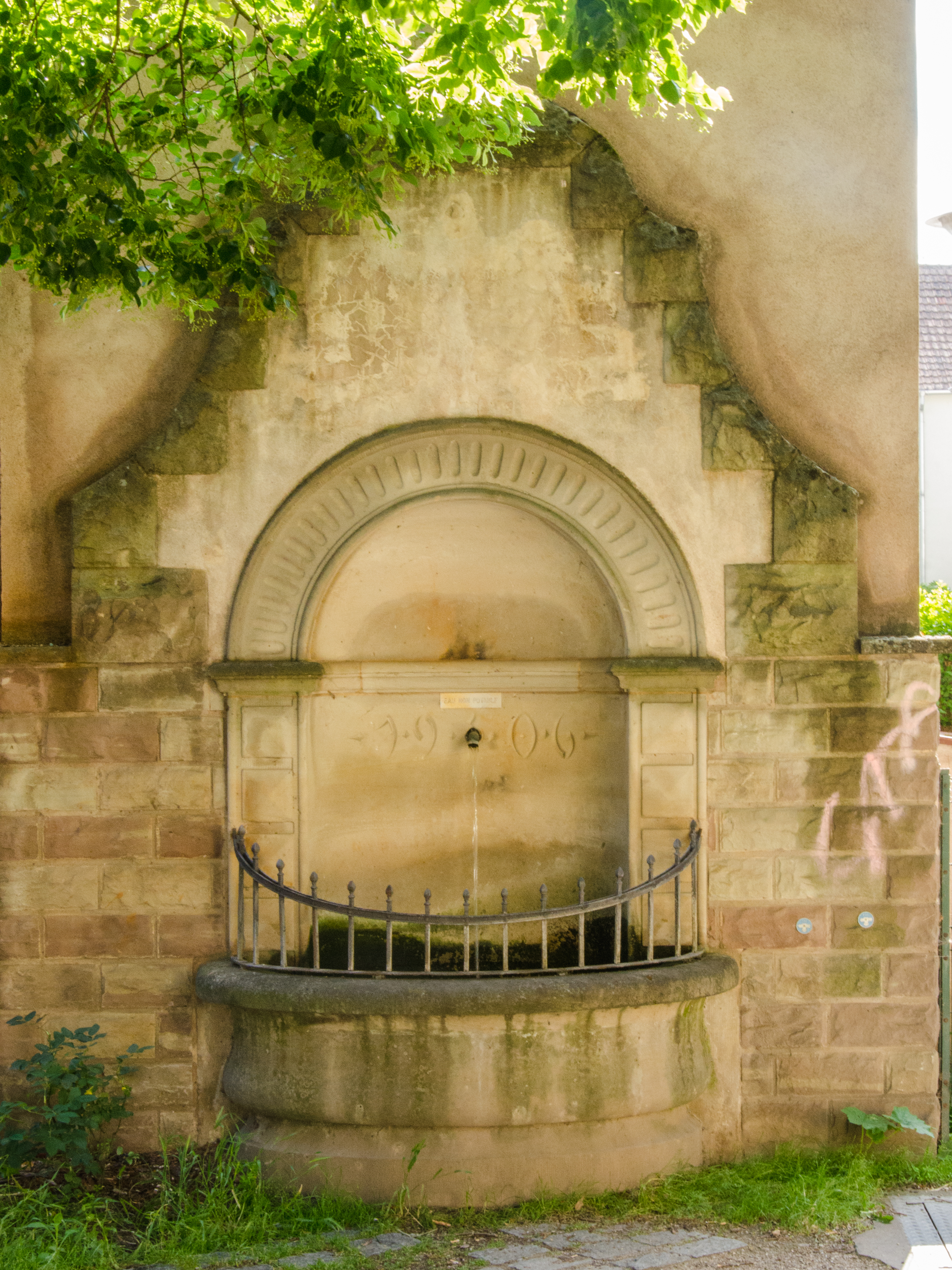 Construite quelque temps après l'ancienne gare du Neudorf, rue de la station. La fontaine continue à subsister après le remplacement de la gare puisqu'elle fut déplacé, derrière la place du marché du Neudorf, à l'ombre d'un arbre dans les années 80.